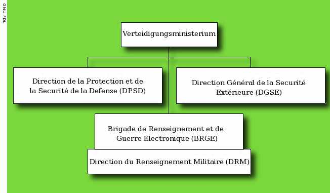 Nachrichtendienste unter Verteidigungsm. GNU FDL